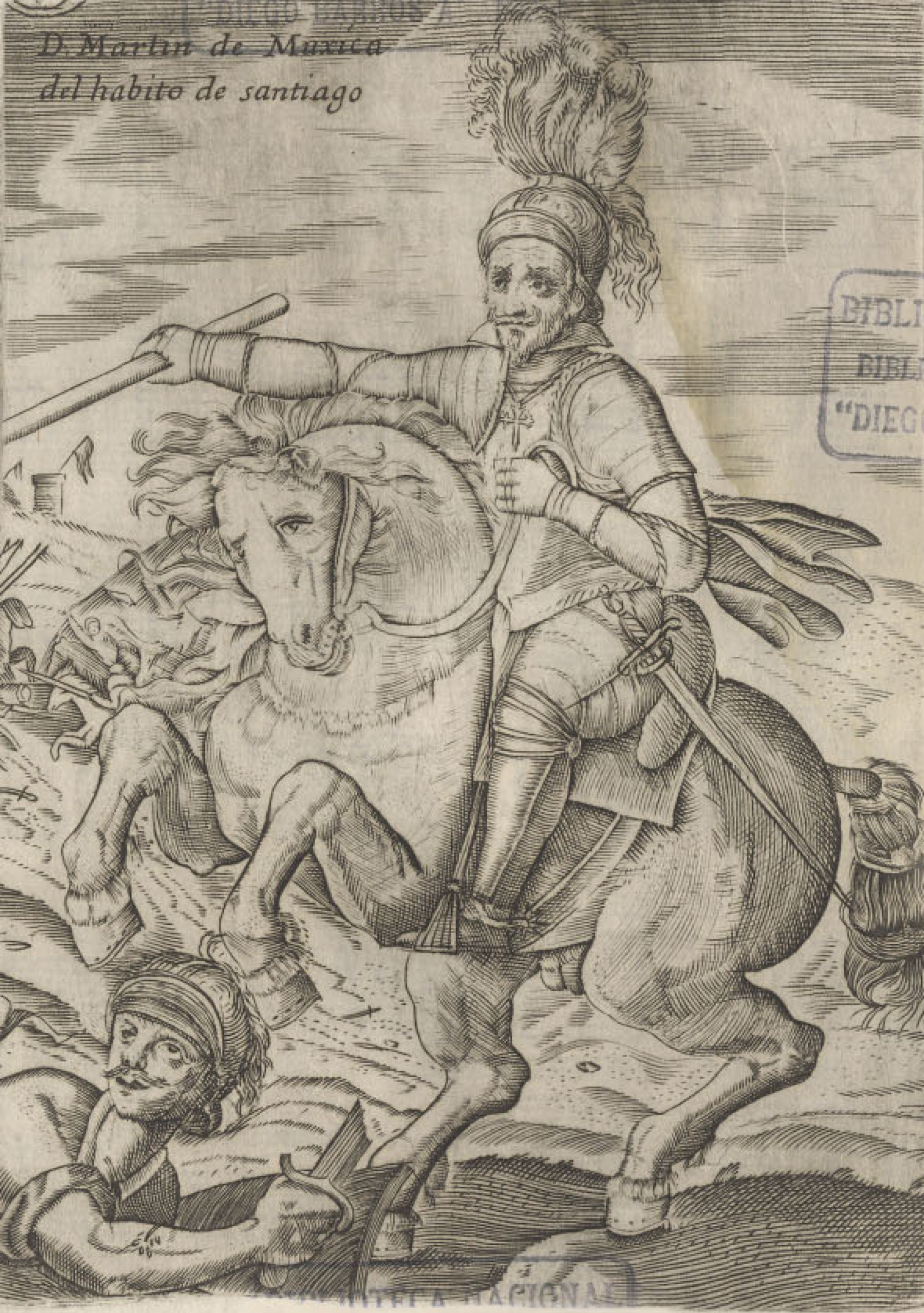 Martín de Mujica: Chile's spaniard governator (1646-1649). // Gobernador español de Chile entre 1646 y 1649.